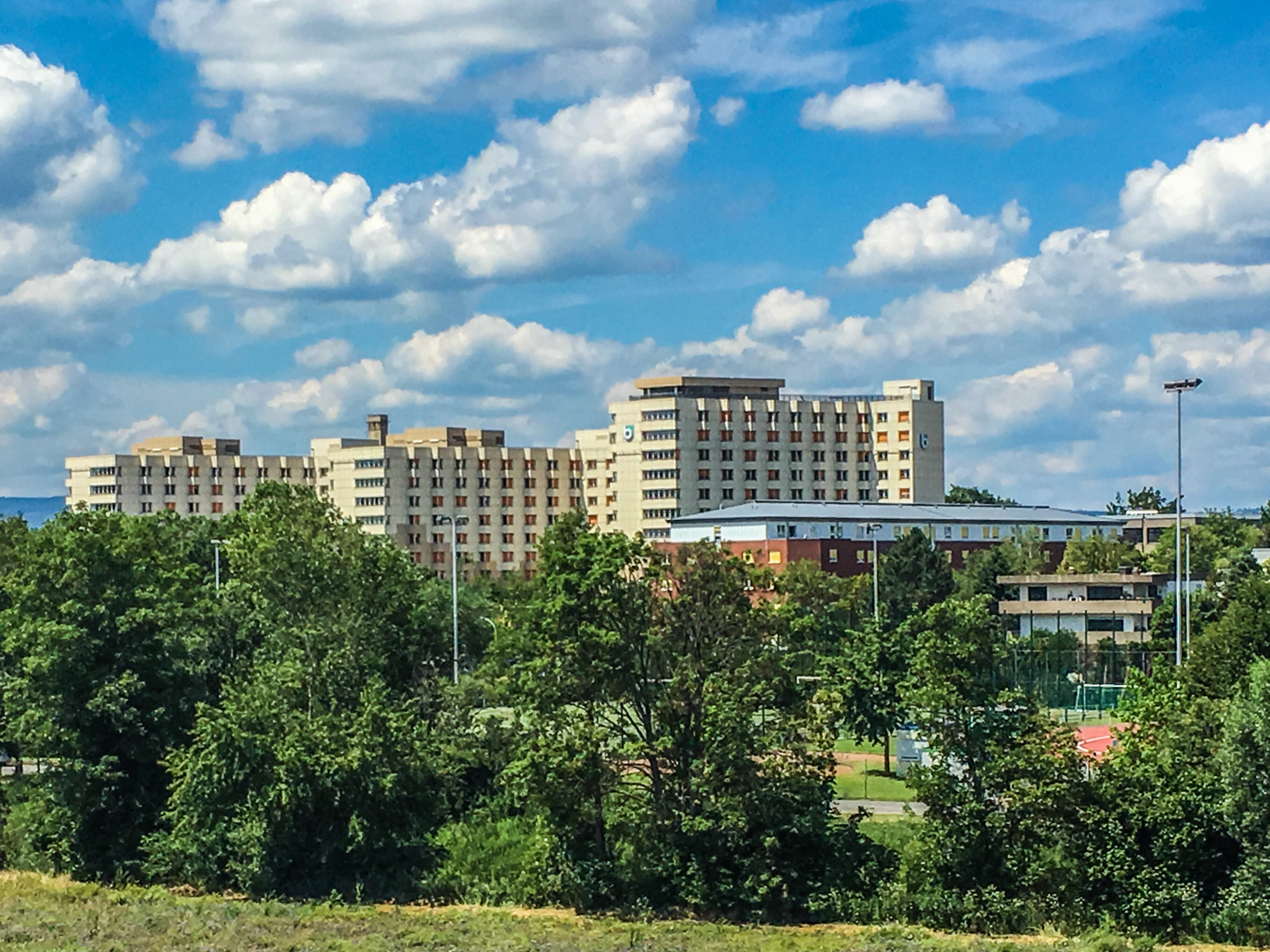 Blick vom S-Bahnhof Bad Vilbel Süd auf die drei Wohnheimgebäude sowie das Gästehaus des Berufsförderungswerks Frankfurt am Main